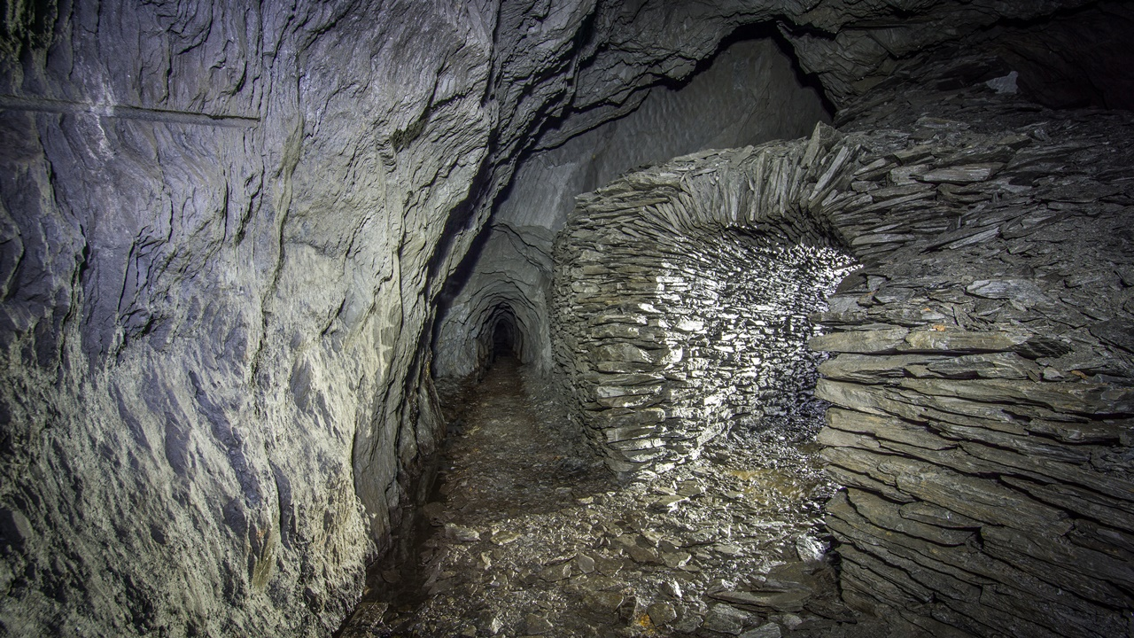 Versatzmauer Findling